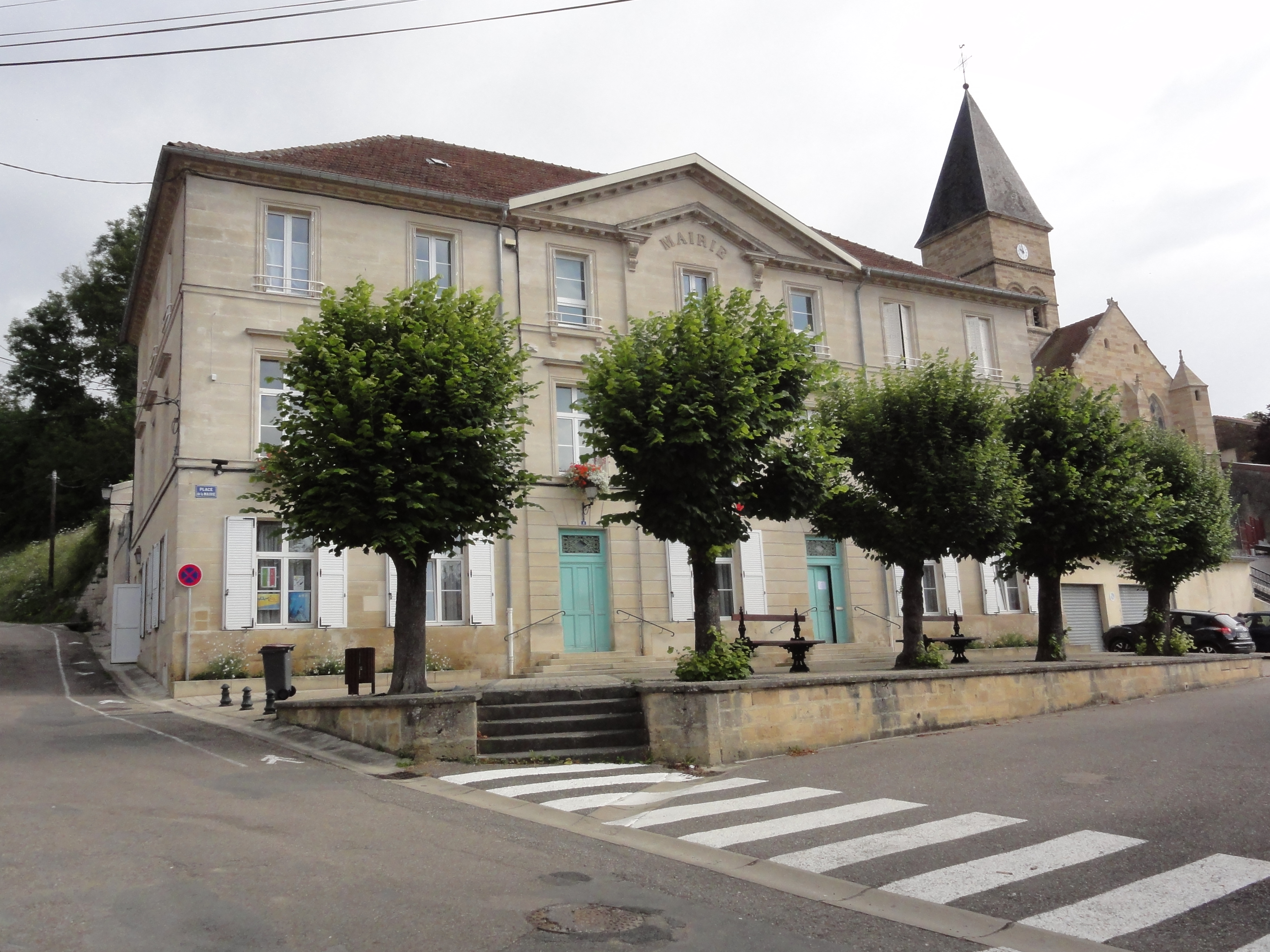 Trémont-sur-Saulx (Meuse) mairie